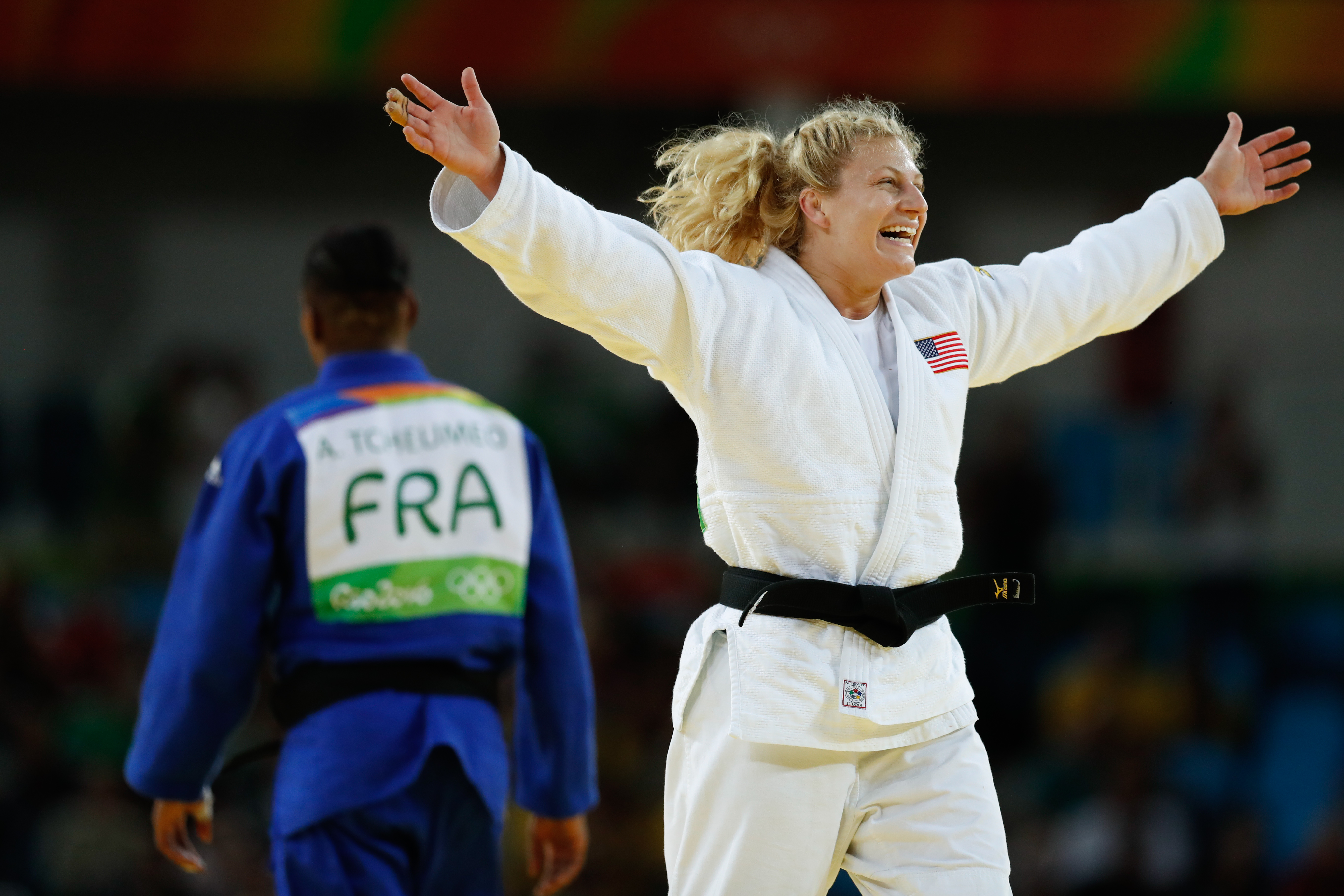 Rio de Janeiro - A judoca norte-americana Kayla Harrison vence a francesa Audrey Tcheumeo na categoria até 78 quilos e ganha medalha de ouro na Rio 2016 (Fernando Frazão/Agência Brasil)